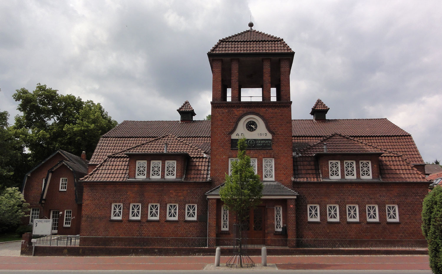 Riesturnhalle in Ritterhude. Stiftungsgebäude der Gebr. Ries von 1912